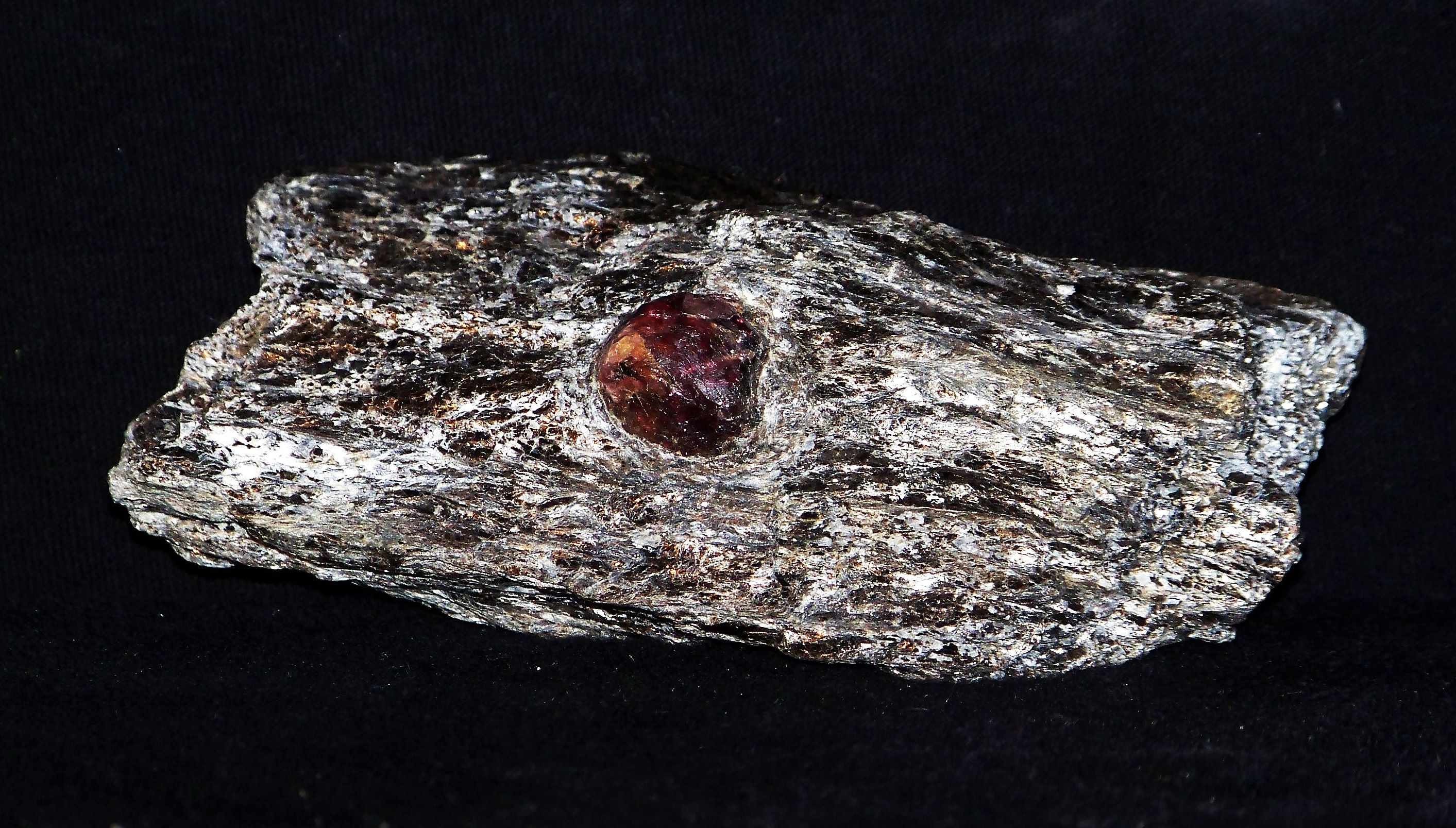 łupek muskowitowy z almandynem, pól. Kolski, Rosja